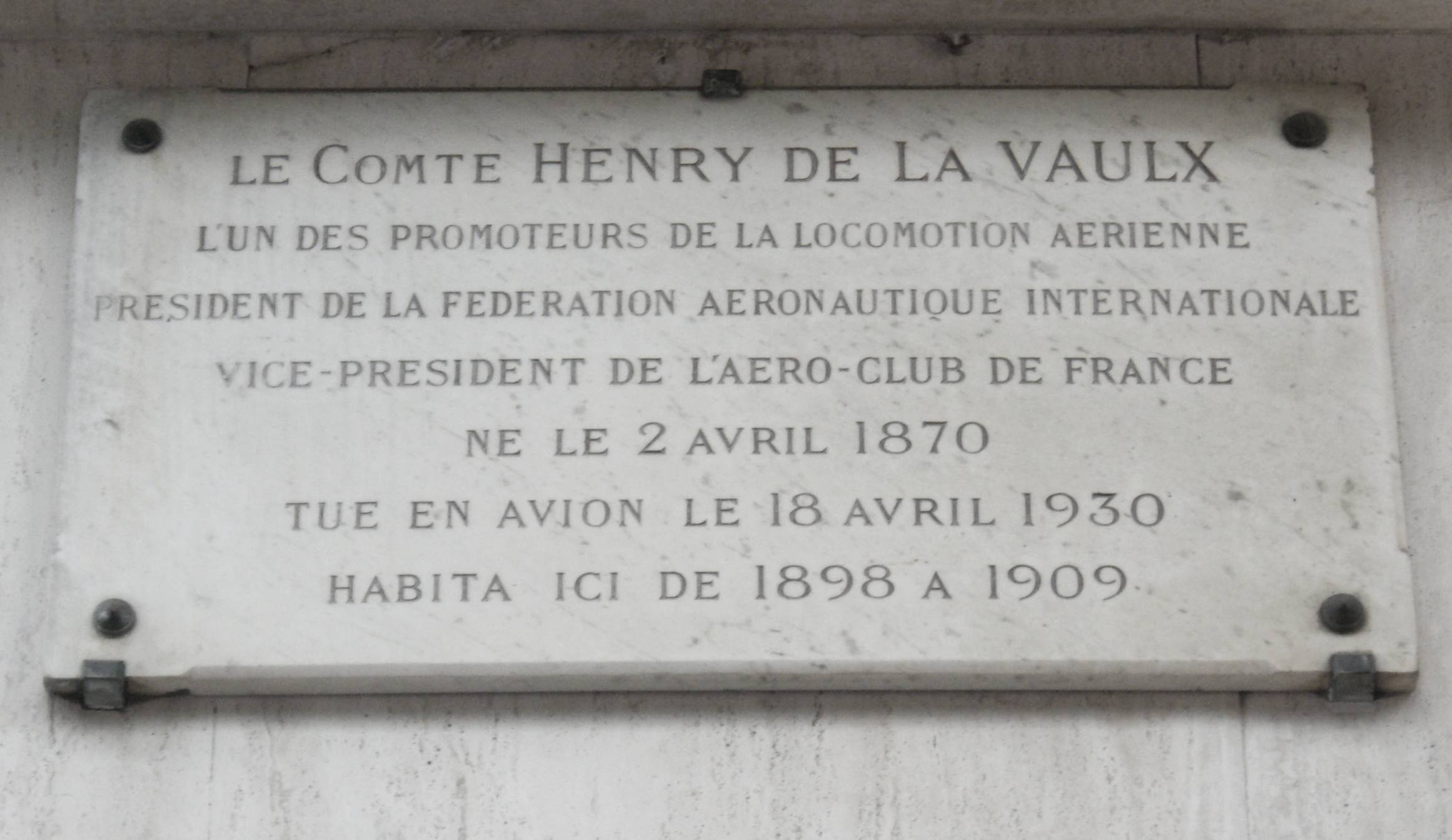 Plaque apposée au n° 122 de l'avenue des Champs-Élysées, Paris 8e.« Le comte Henry de La Vaulx, l'un des promoteurs de la locomotion aérienne, président de la Fédération aéronautique internationale, vice-président de l'Aéro-Club de France, né le 2 avril 1870, tué en avion le 18 avril 1930, habita ici de 1898 à 1909. »